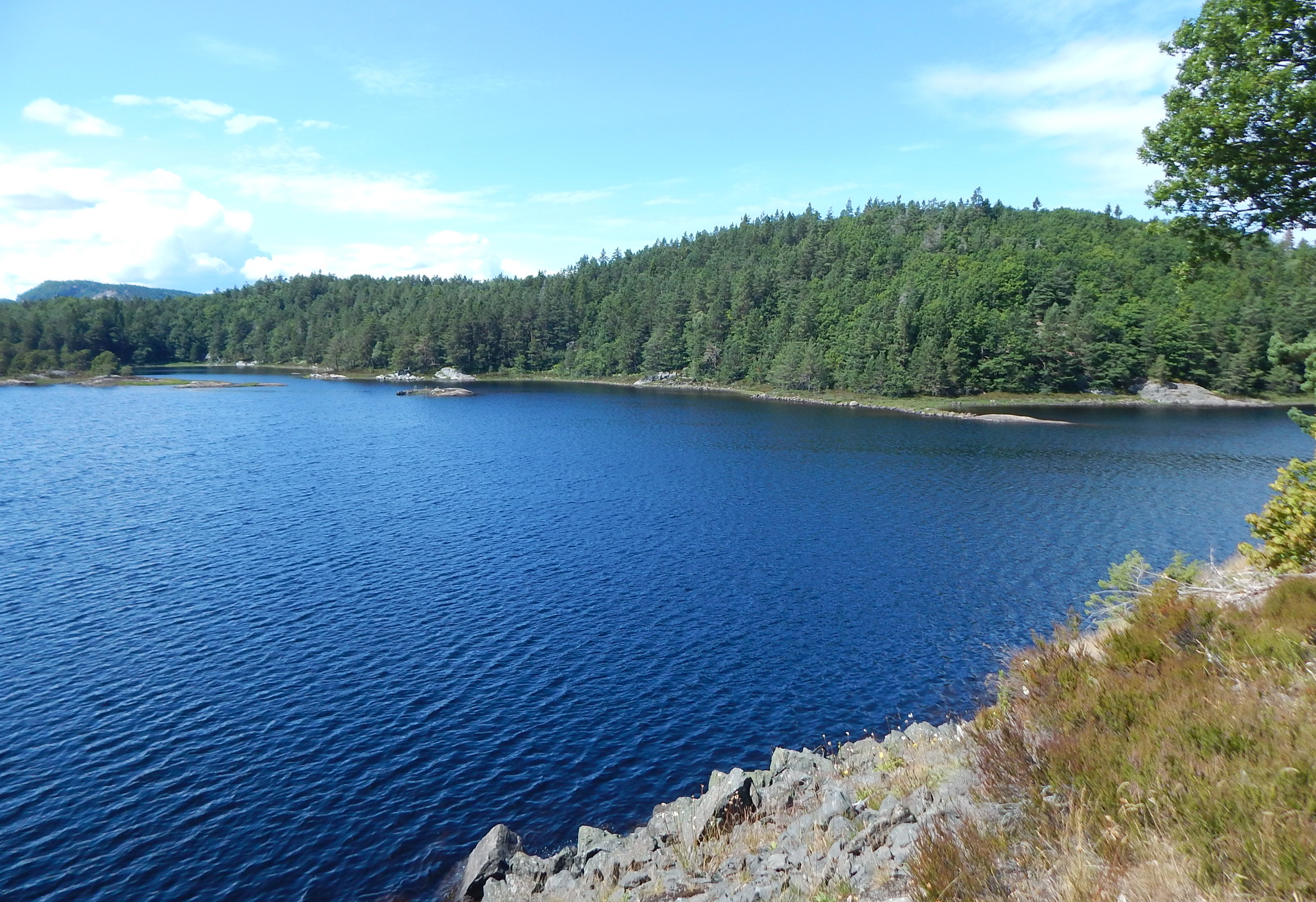 Syndle i Grimstad